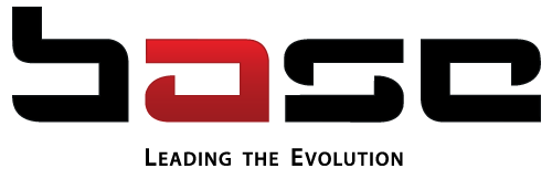 Base logo